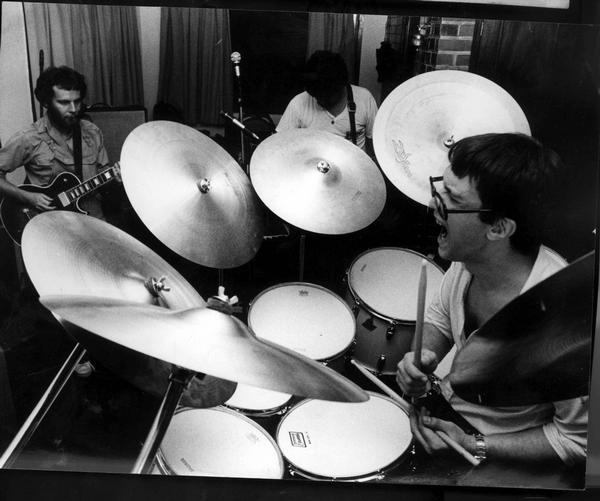 Es una foto del baterista Javier Martinez (líder de Manal) y en un costado Claudio Gabis, guitarra de ese grupo.